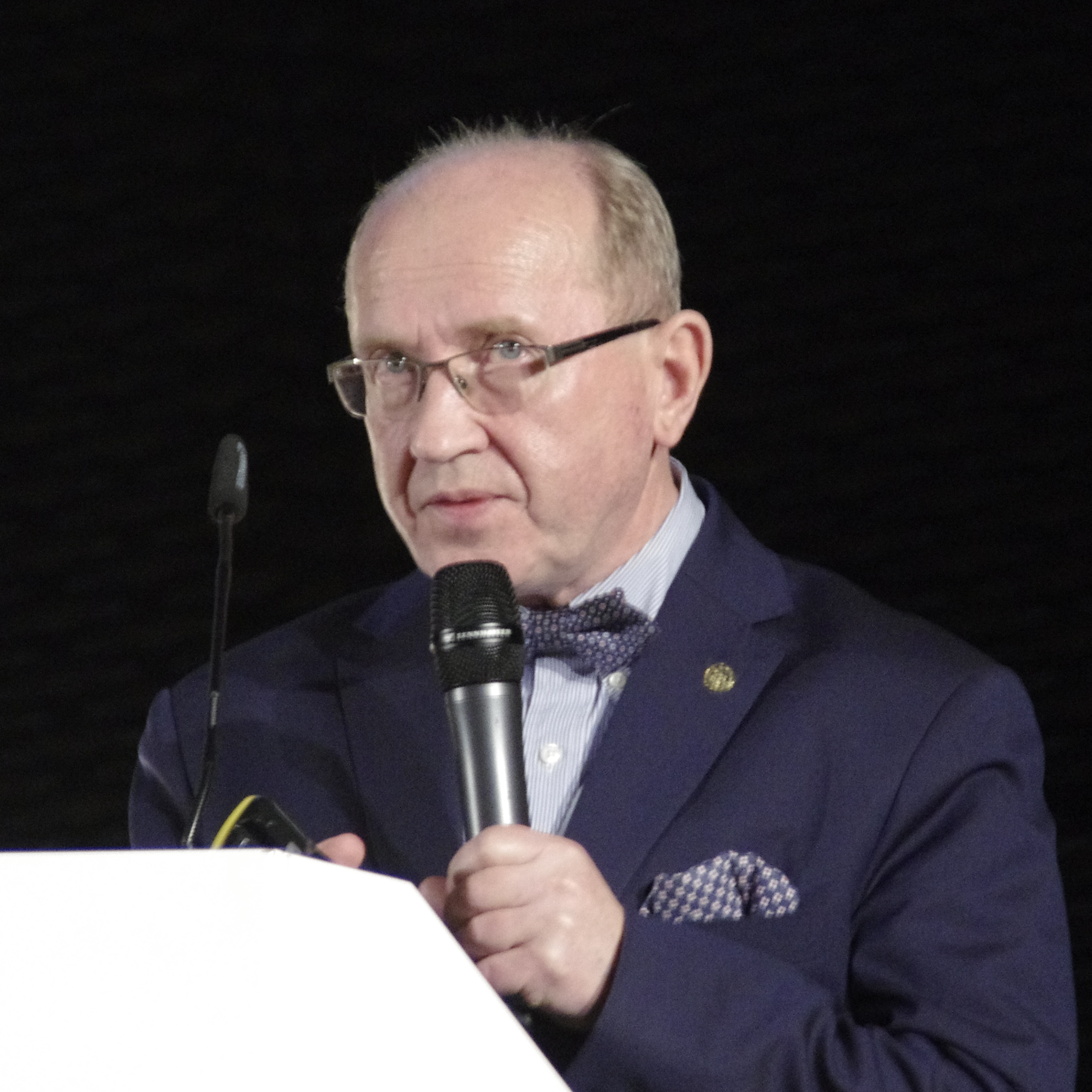 Henryk Skarżyński (1954– ), polski lekarz otolaryngolog, audiolog i foniatra. Zdjęcie wykonane na prelekcji Henryka Skarżyńskiego podczas 3. Śląskiego Festiwalu Nauki w sali audytoryjnej Międzynarodowego Centrum Kultury w Katowicach.